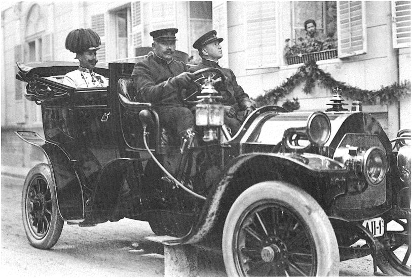 Archduke Eugen in Ischl